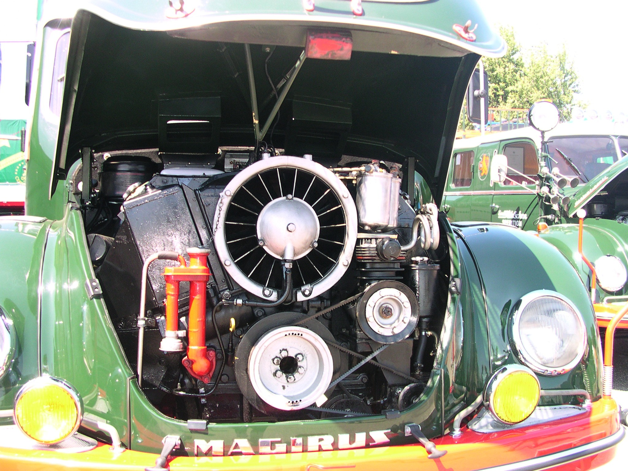 Wörth am Rhein, Oldtimertreffen bei Daimler-Chrysler – Magirus S 6500, luftgekühlter Dieselmotor, 10600 ccm Hubraum, 129 kW (175 PS), vmax 95 km/h, Baujahr 1954